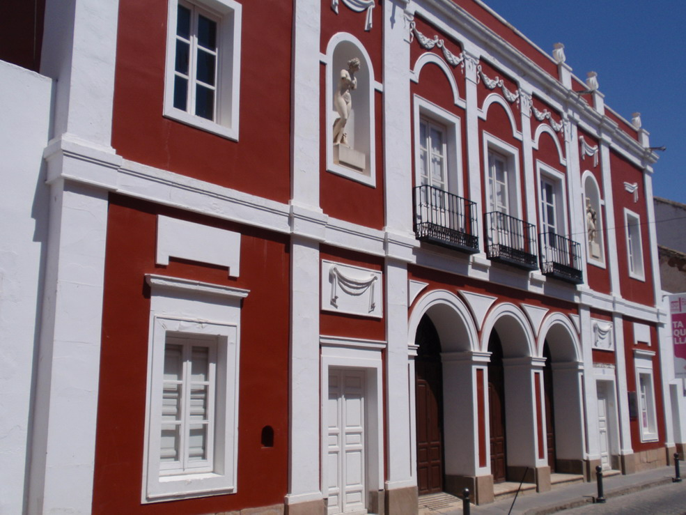 Almagro. Fachada del Teatro Municipal.